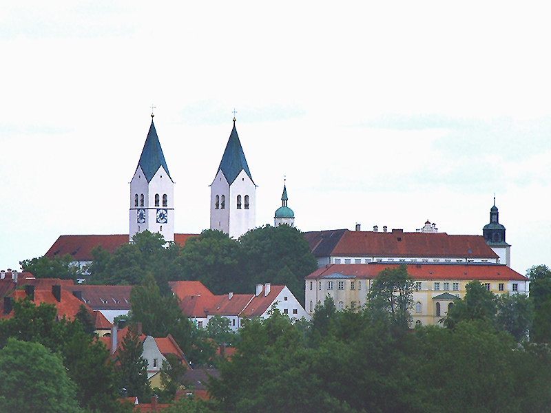 Freisinger Dom (von Westen gesehen)